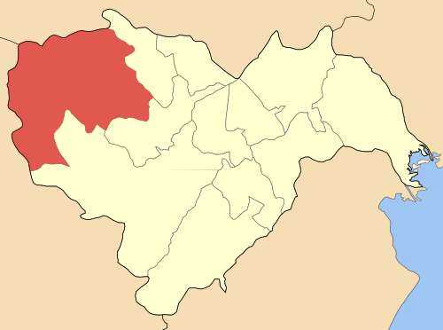 Дем Негуш на картата на Ном Иматия, Гърция. Locator map of Naousas municipality (Δήμος Νάουσας) at Imathias perfecture, Greece.